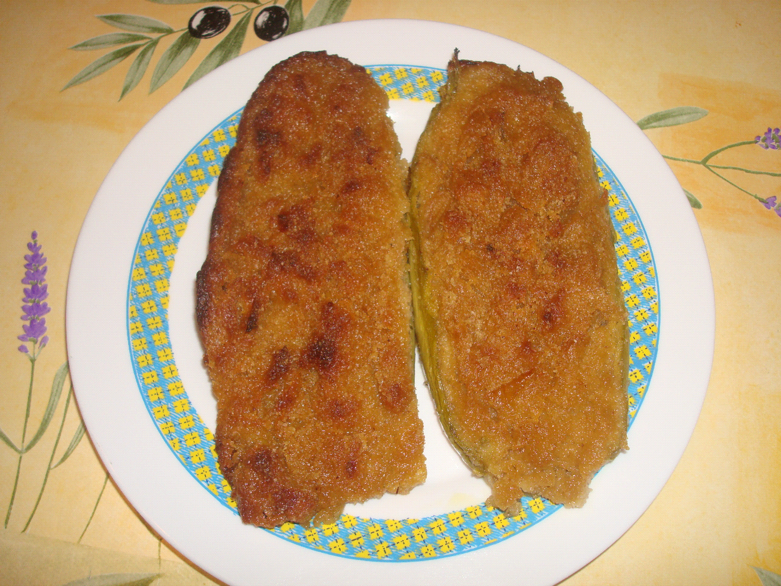 És un plat típic de Menorca